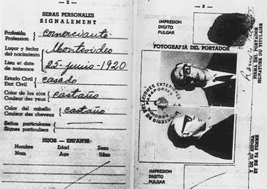 Documento falso de Ernesto Guevara. Realizo en su totalidad en Cuba en 1964